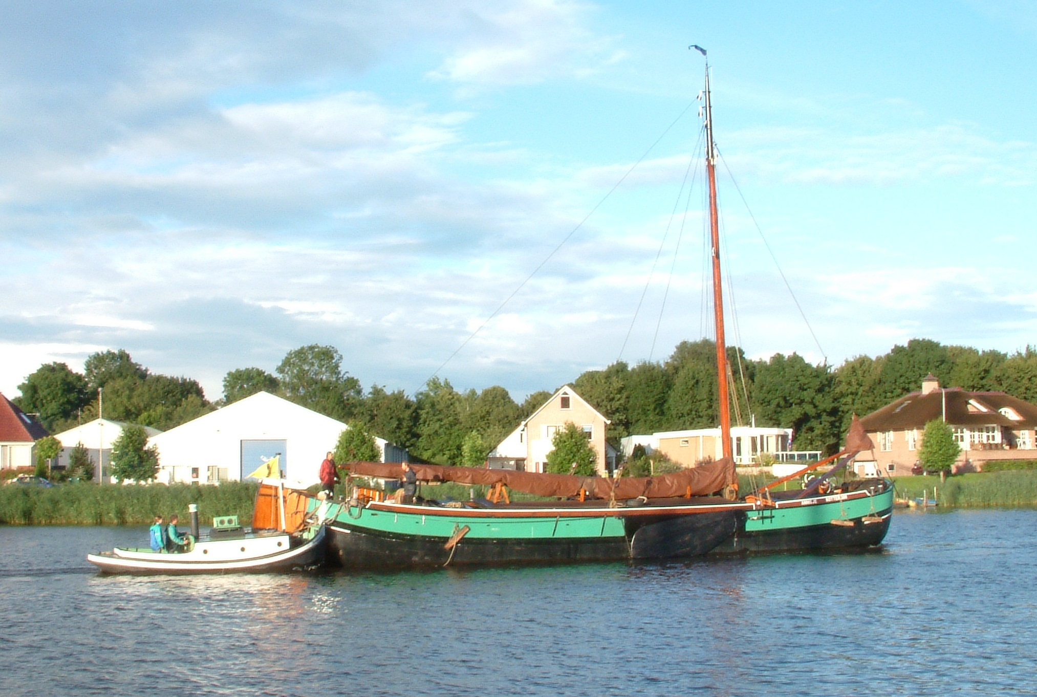 De Annigje opgeduwd voor Hasselt Categorie:Binnenvaart